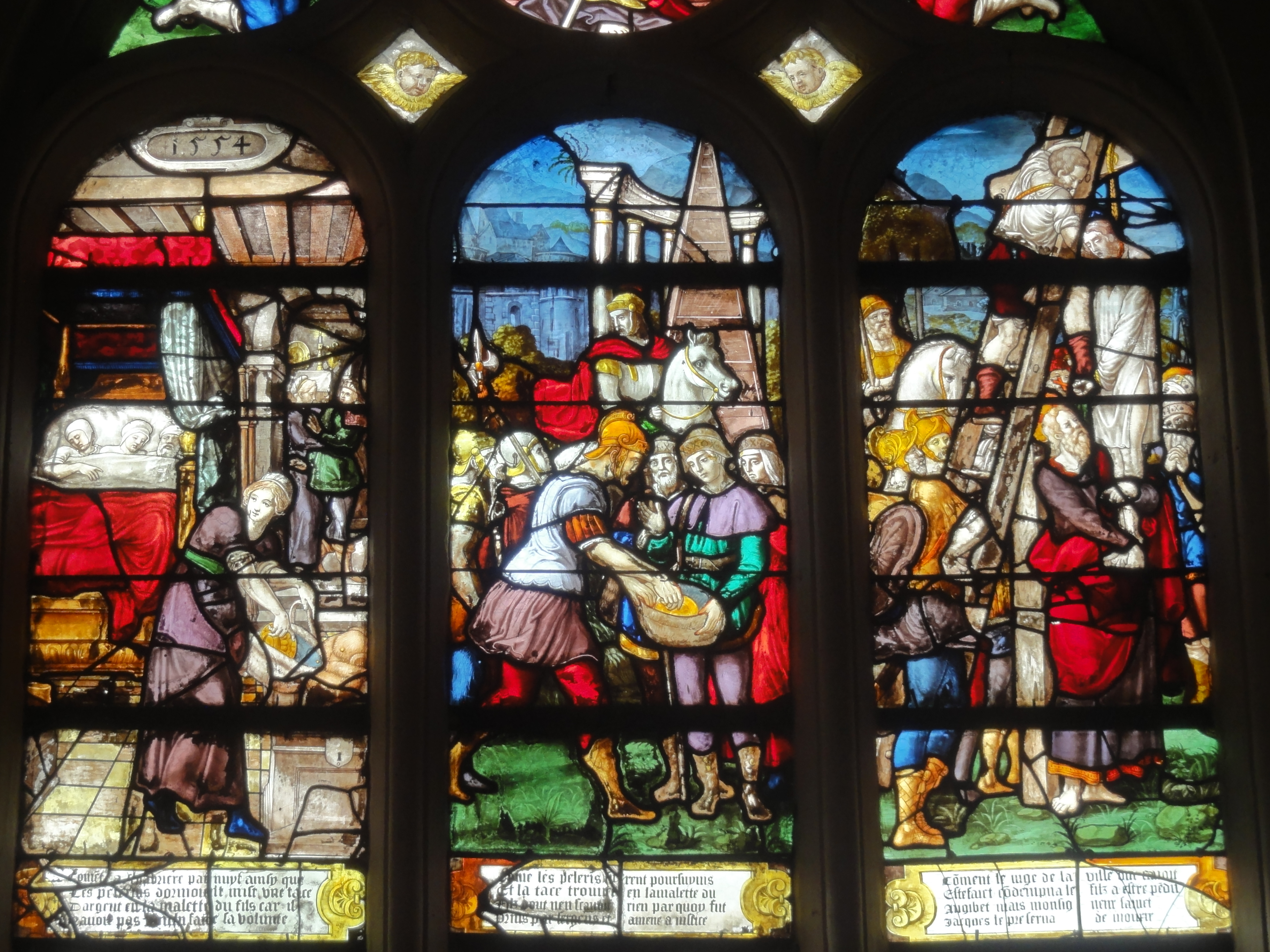 Verrière n° 3.